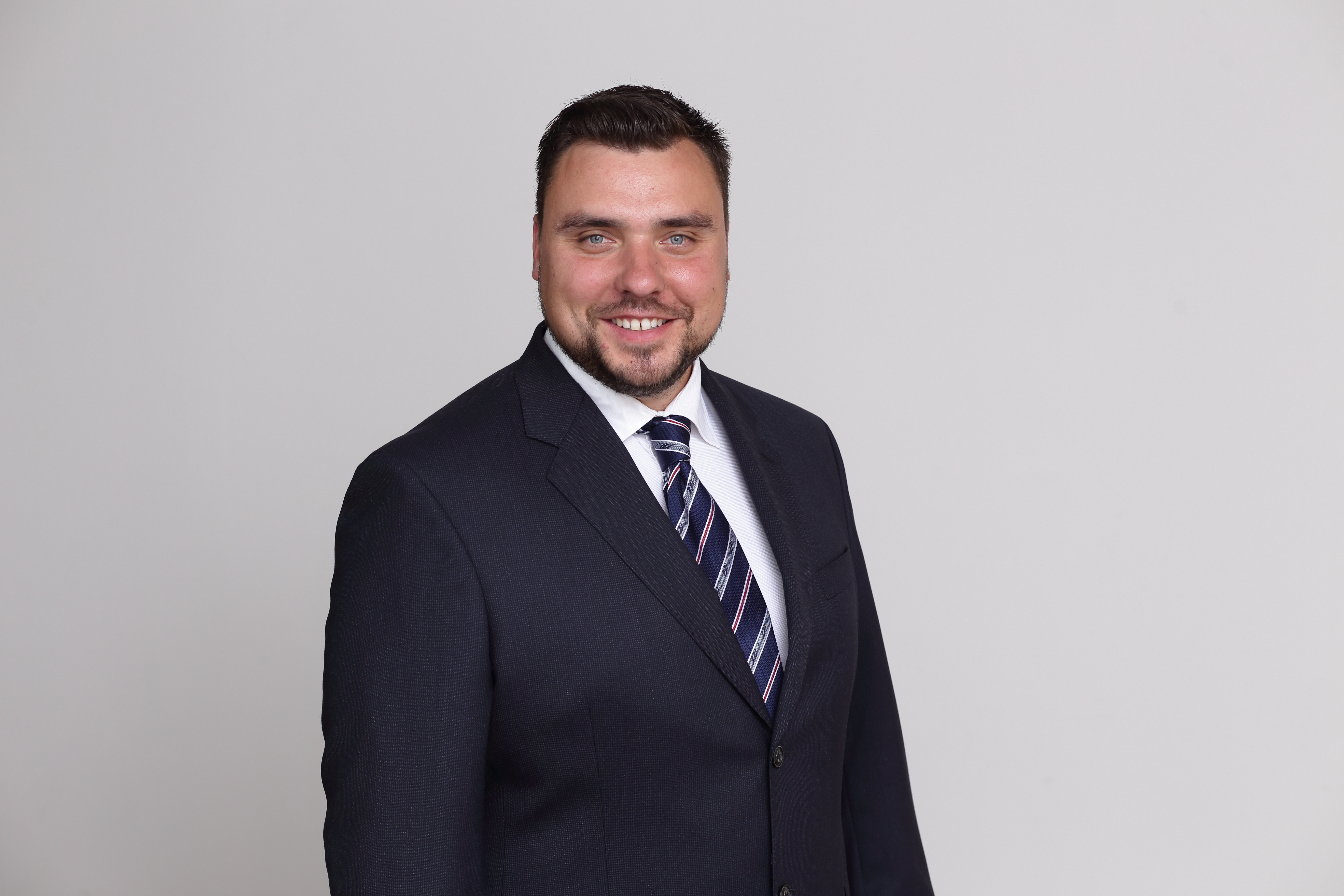 2018. gads 13. saeimas vēlēšanas